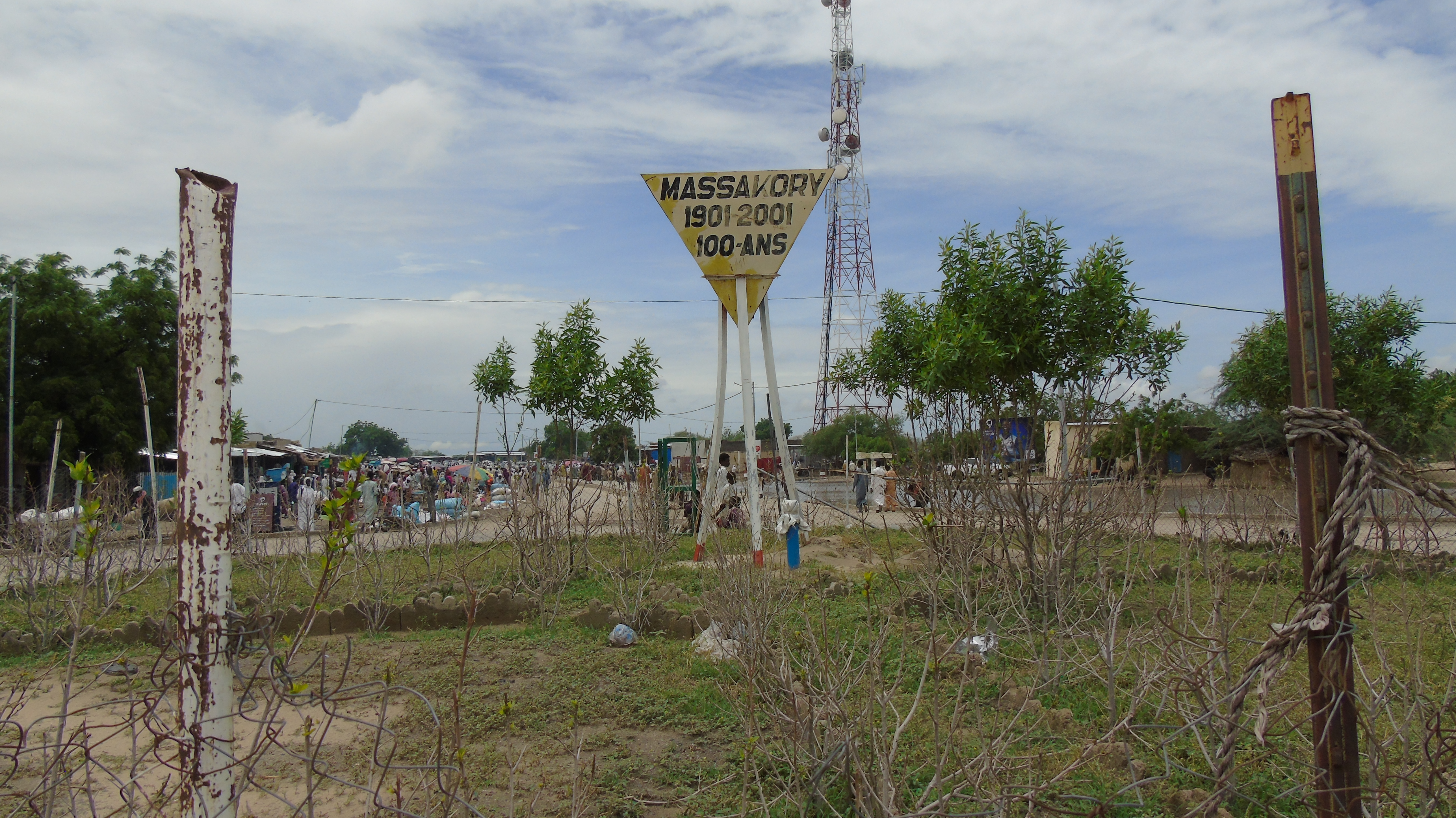 C'est le rond point cent 100 ans à Massakory, chef lieu de la province de Hadjer Lamis au Tchad